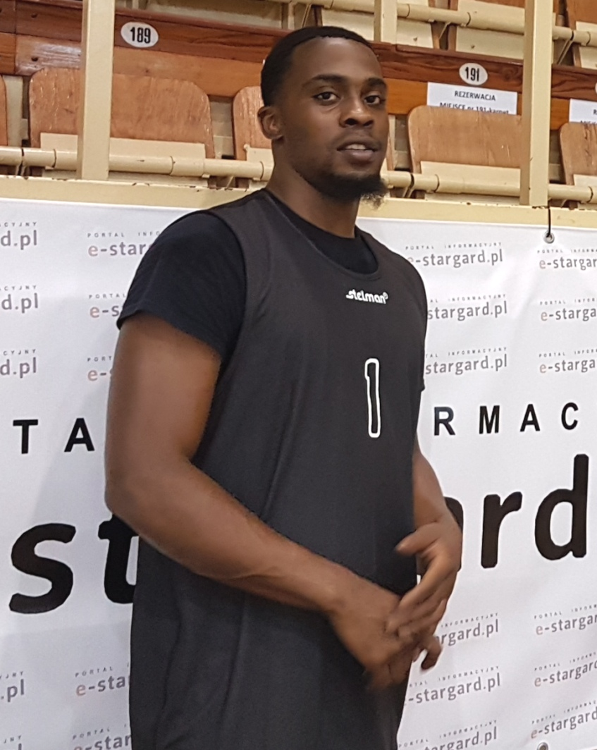 Anthony Hickey